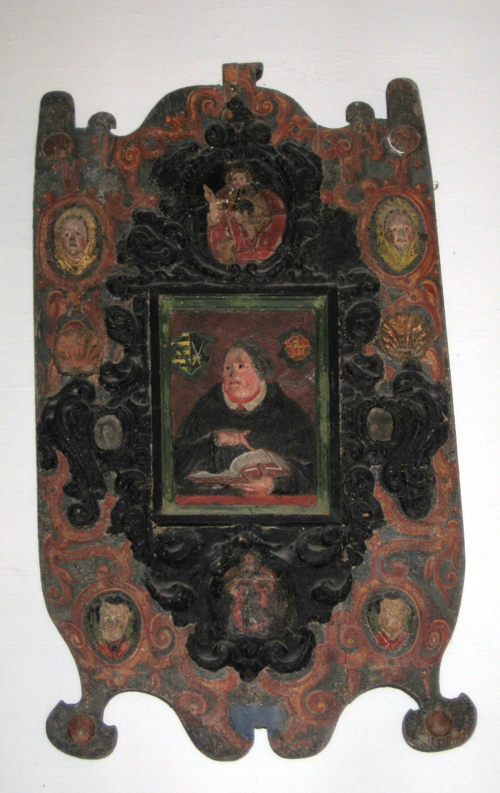 Dorfkirche Böllberg in Halle (Saale), an der Straße der Romanik. - OpenStreetMap(Info)